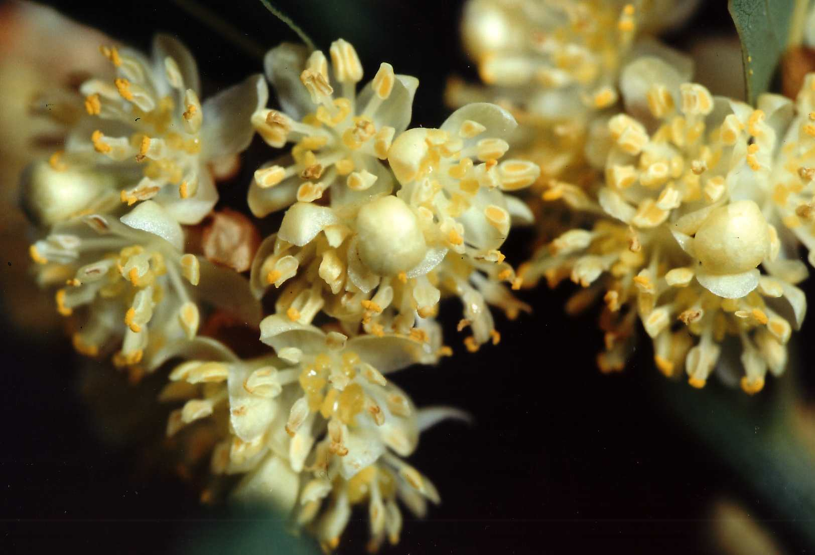 Fleurs de laurier sauce (Laurus Nobilis)